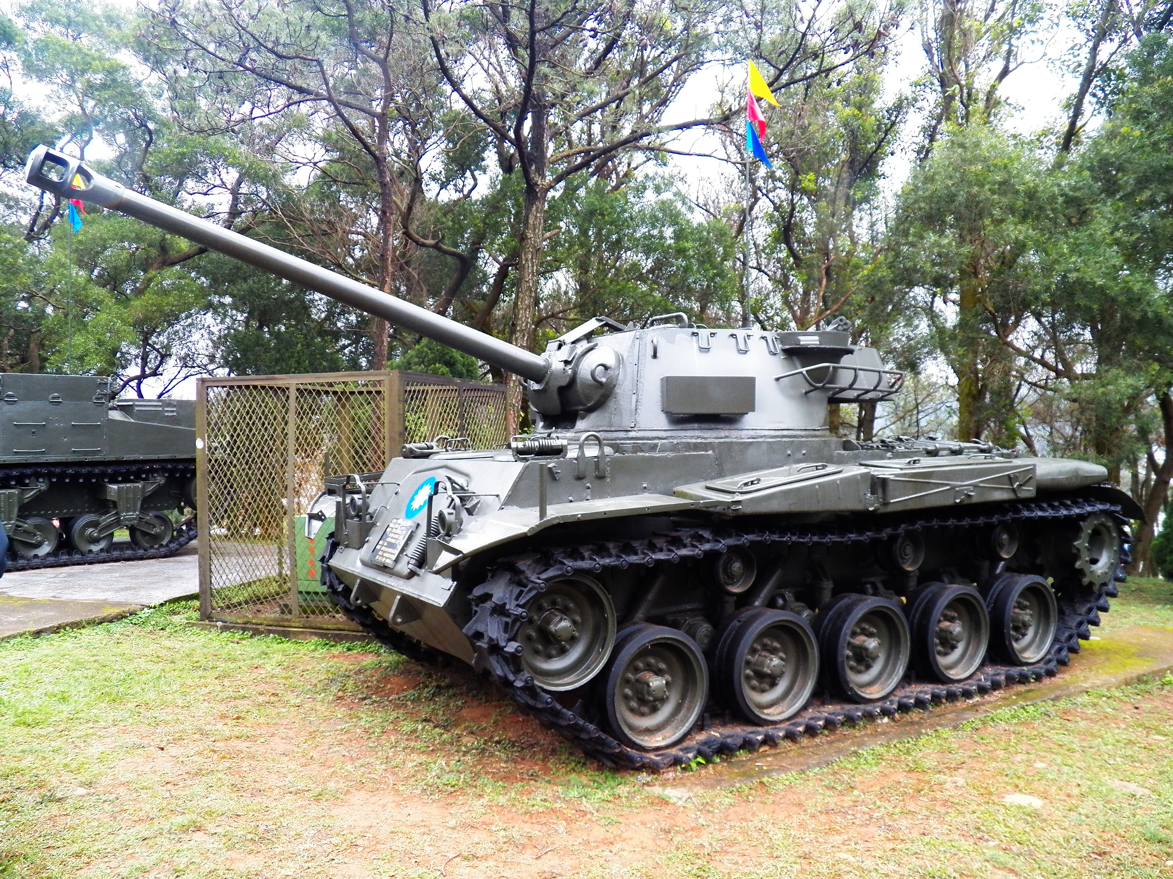 裝甲兵學校戰車公園展示的六四式輕戰車。